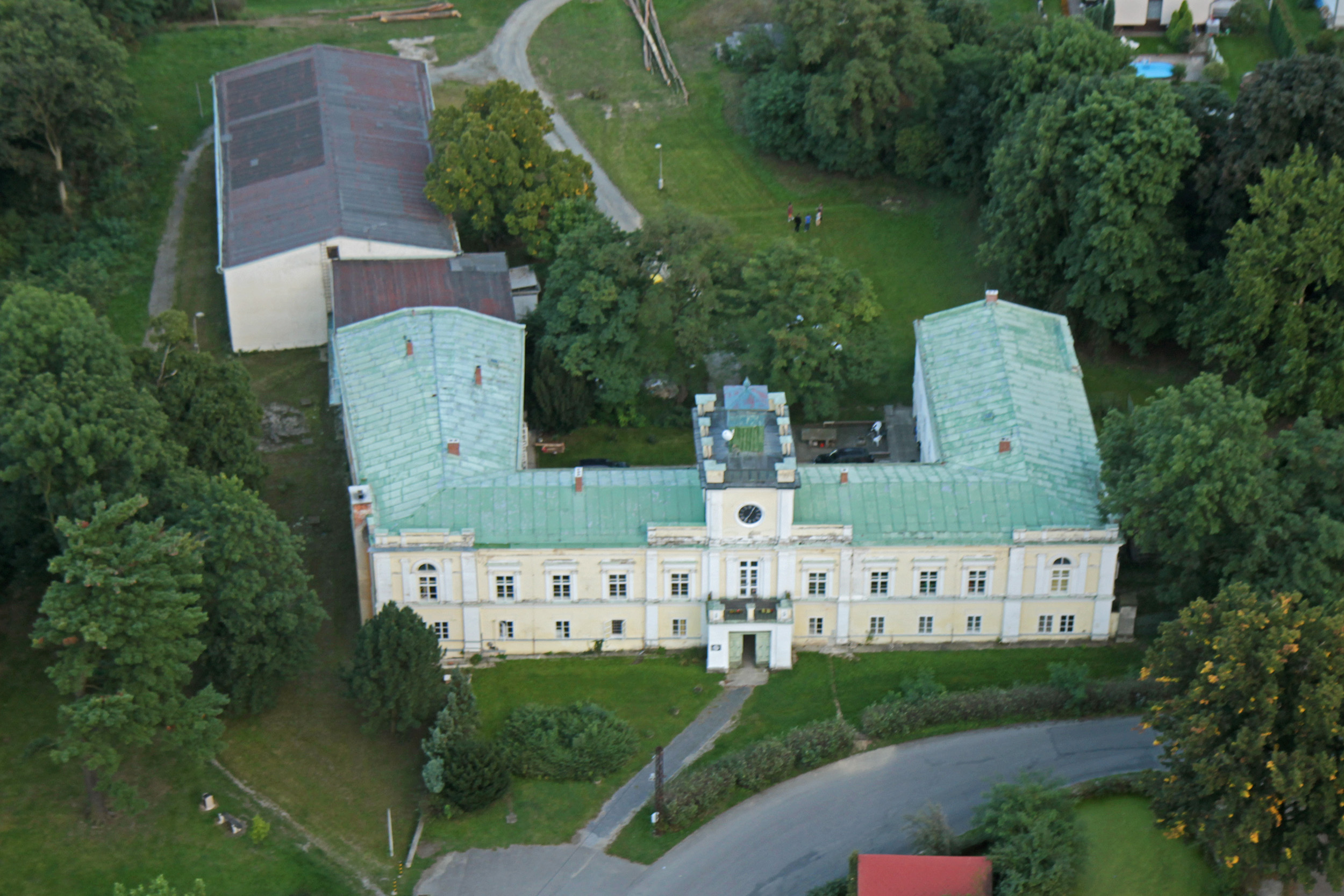 Zámek Skalsko, Skalsko 1